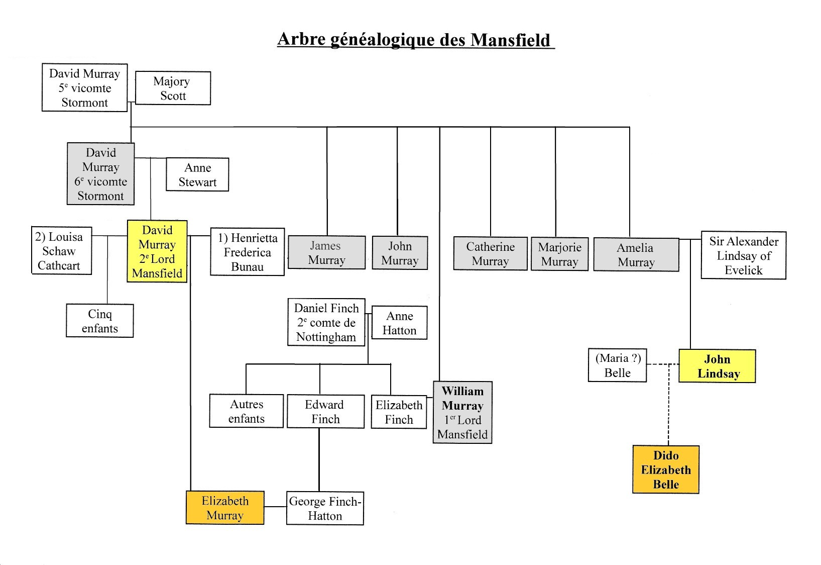 Arbre généalogique de la famille de William Murray, 1er Lord Mansfield